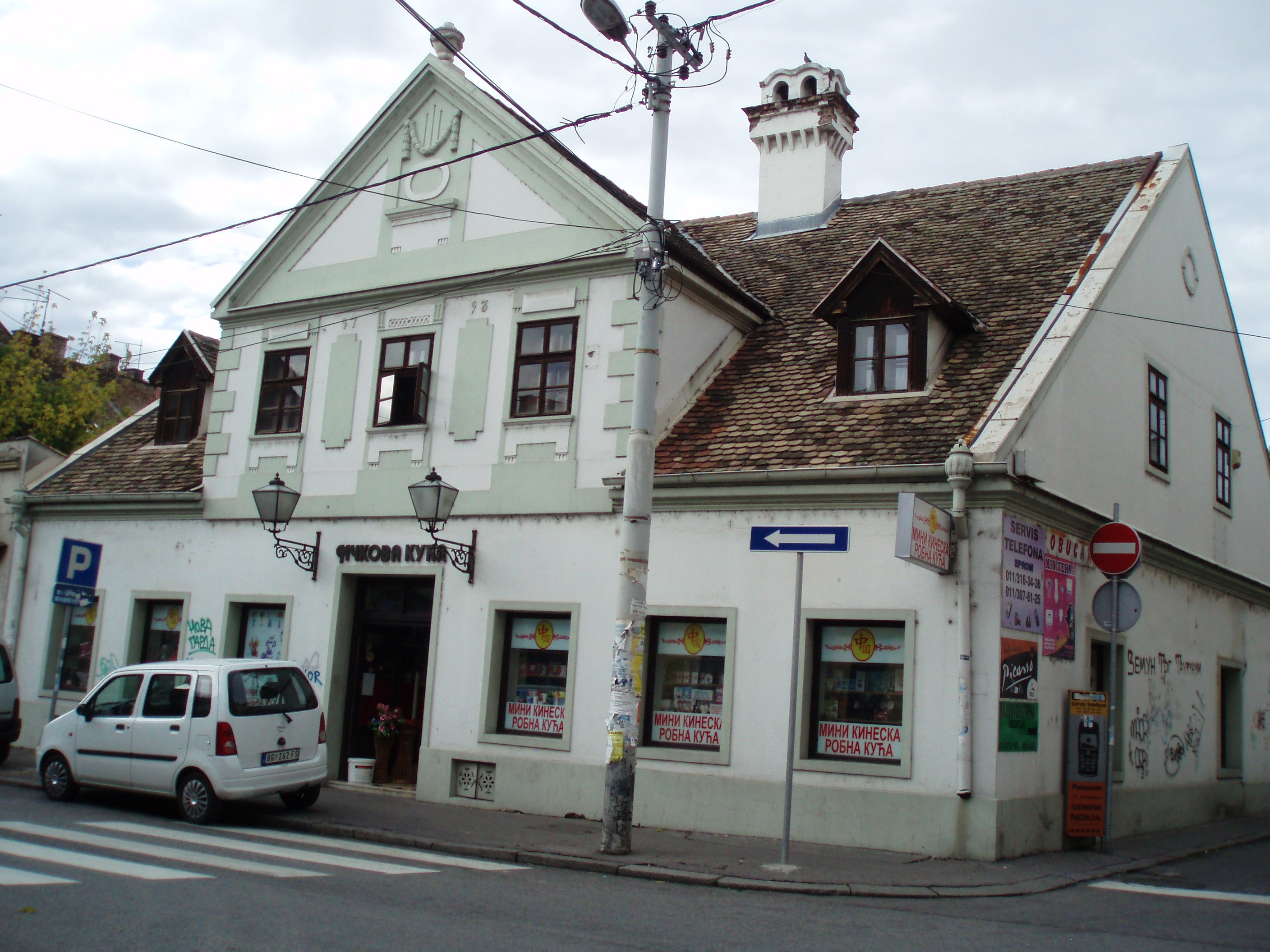 Ičkova kuća Zemun Bešanijska 18, Autor:Nicolo